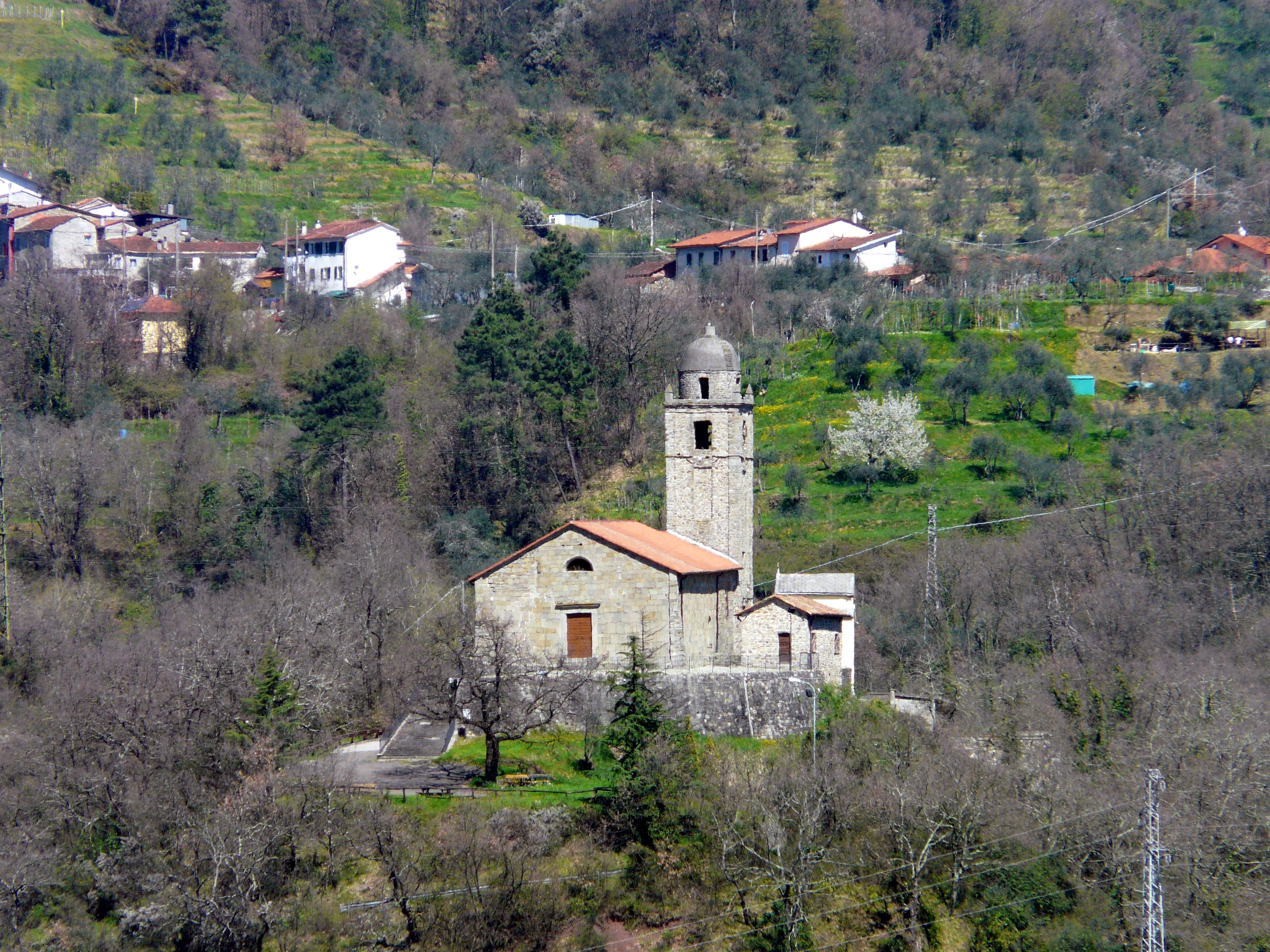 La pieve di Sant'Andrea a Montedivalli, Podenzana, Toscana, Italia